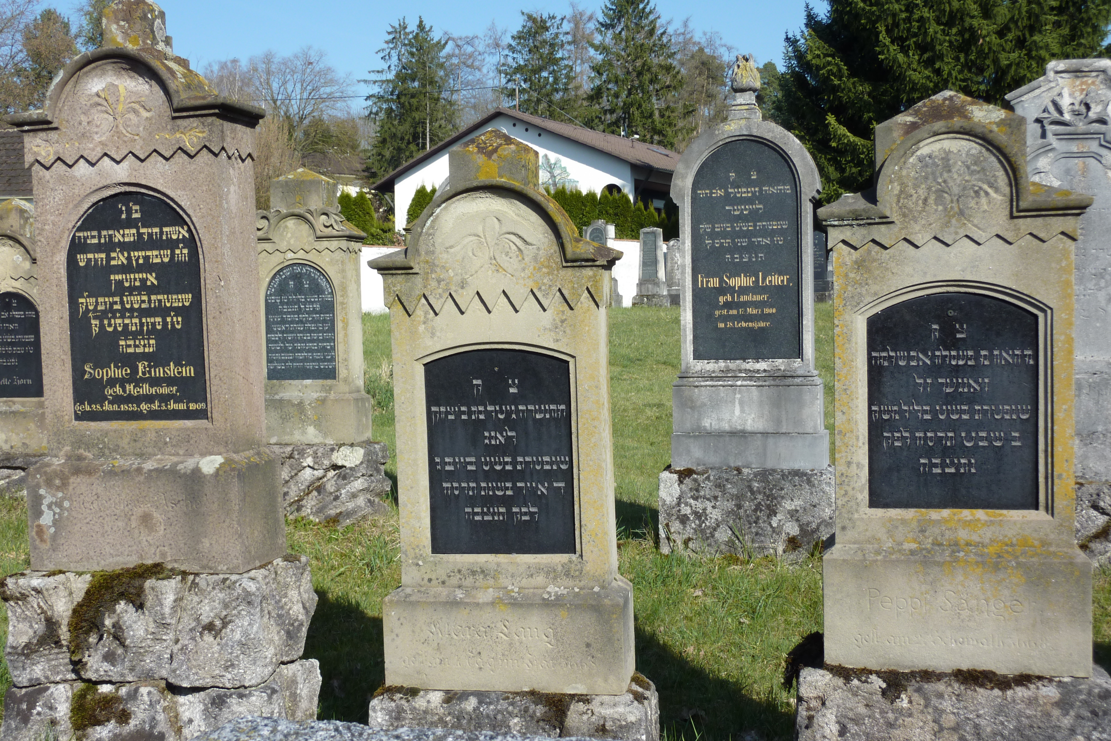 Jüdischer Friedhof in Buttenwiesen, Grabreihen